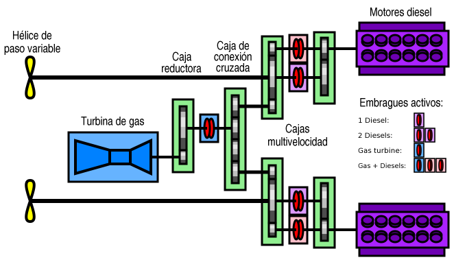 Esquema de un sistema CODAG, con transmisiones dobles para los diésel Same as Image:CODAG-diagram.png with Spanish legend. Modified version of a public domain drawing made by Alureiter. Modifications also released into public domain. Idéntica a Image:CODAG-diagram.png con leyendas en español. Versión modificada de un dibujo hecho por Alureiter y puesto por él en el dominio público. Las modificaciones son también colocadas en el dominio público.